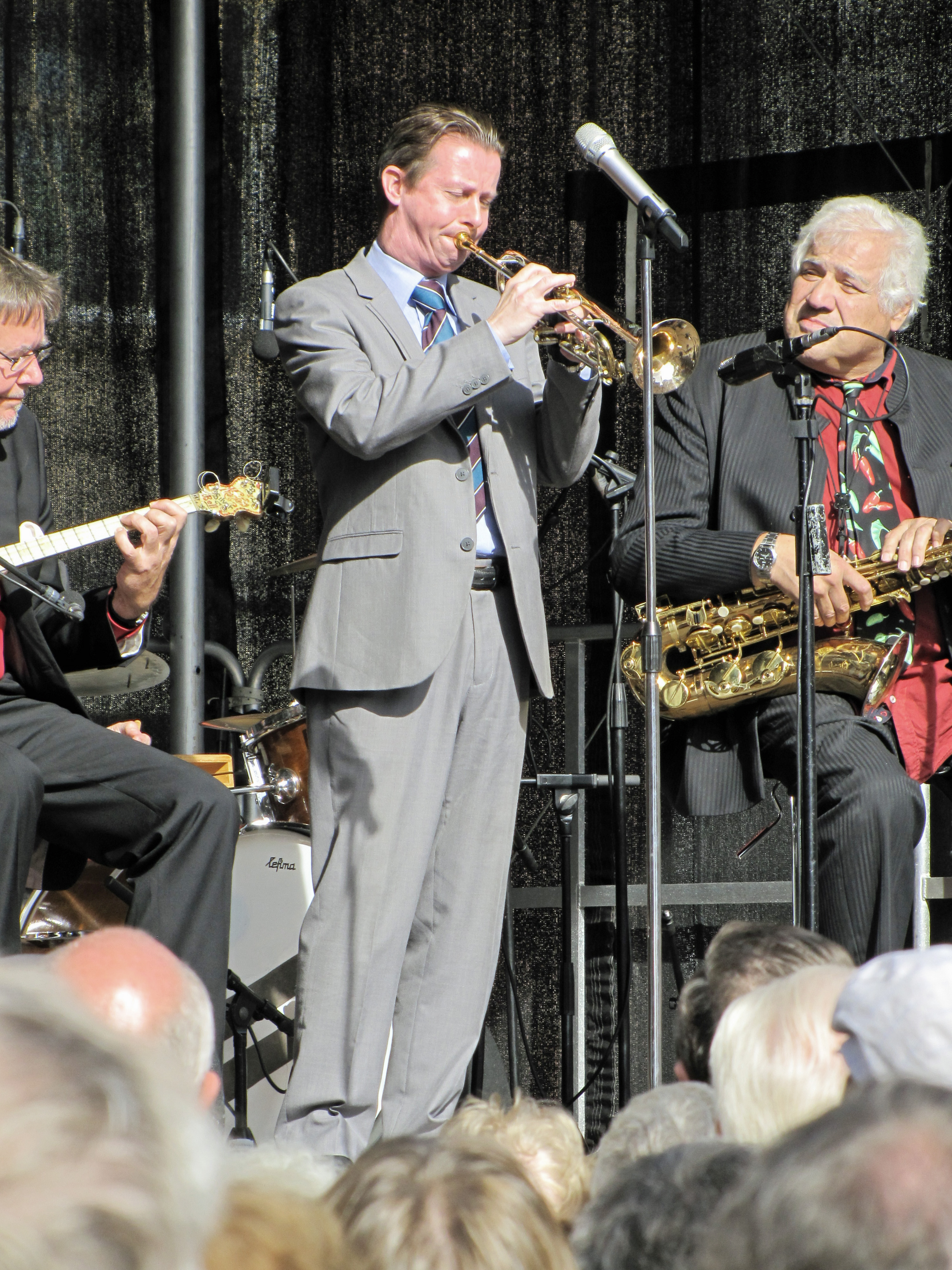 Colin Dawson von den "Red Hot Hottentots", bei "Jazz zum Dritten" 2013, auf dem Römerberg in Frankfurt am Main.